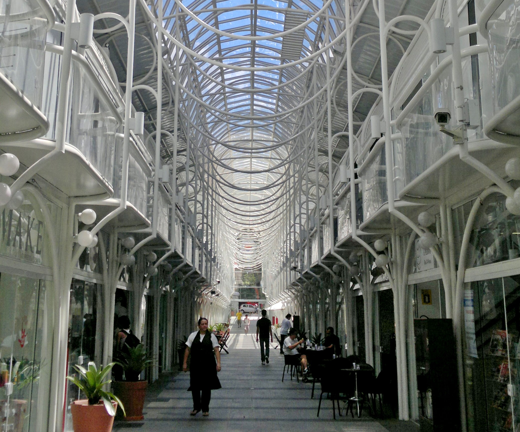 Vista interna da Rua 24 Horas, Curitiba, Paraná, Sul do Brasil.